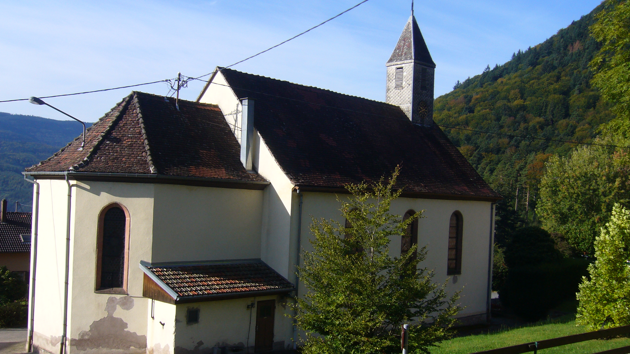 Eglise Saint-Louis, La Vancelle